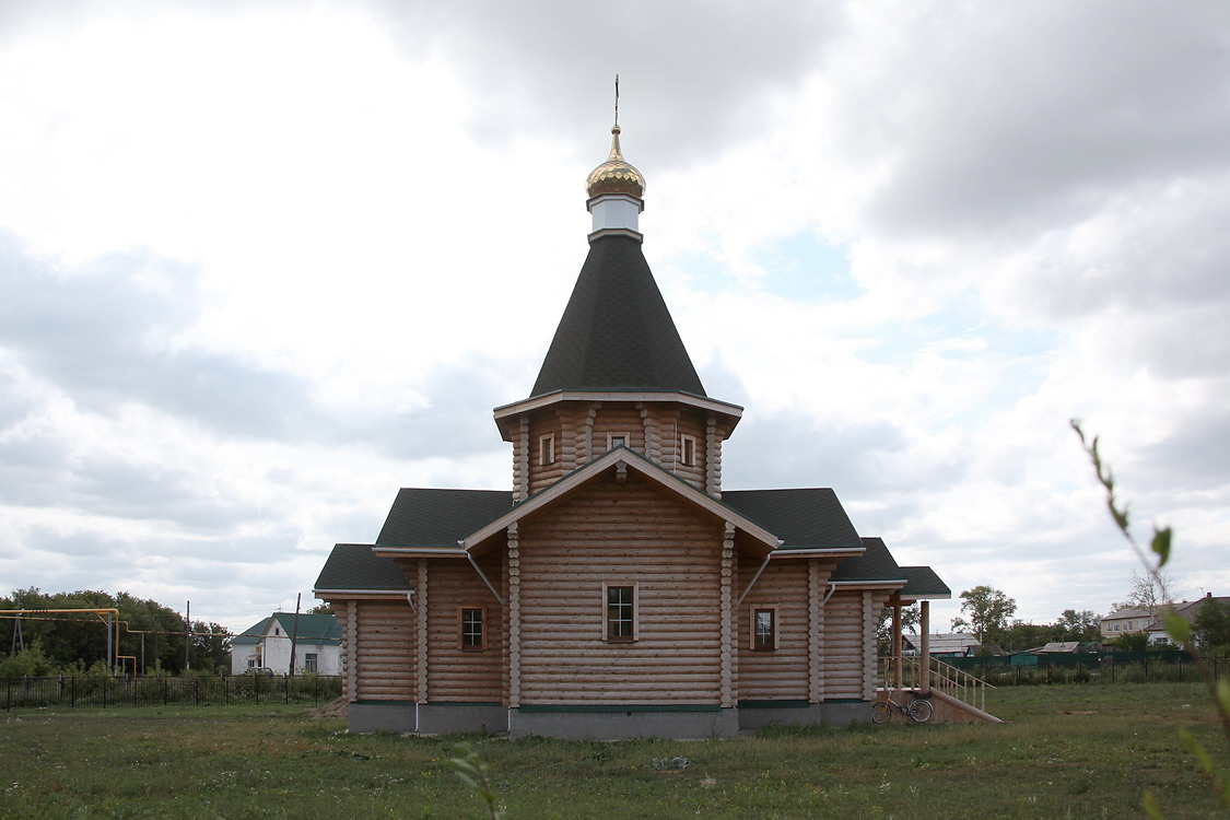 Светлое. Церковь Серафима Саровского.